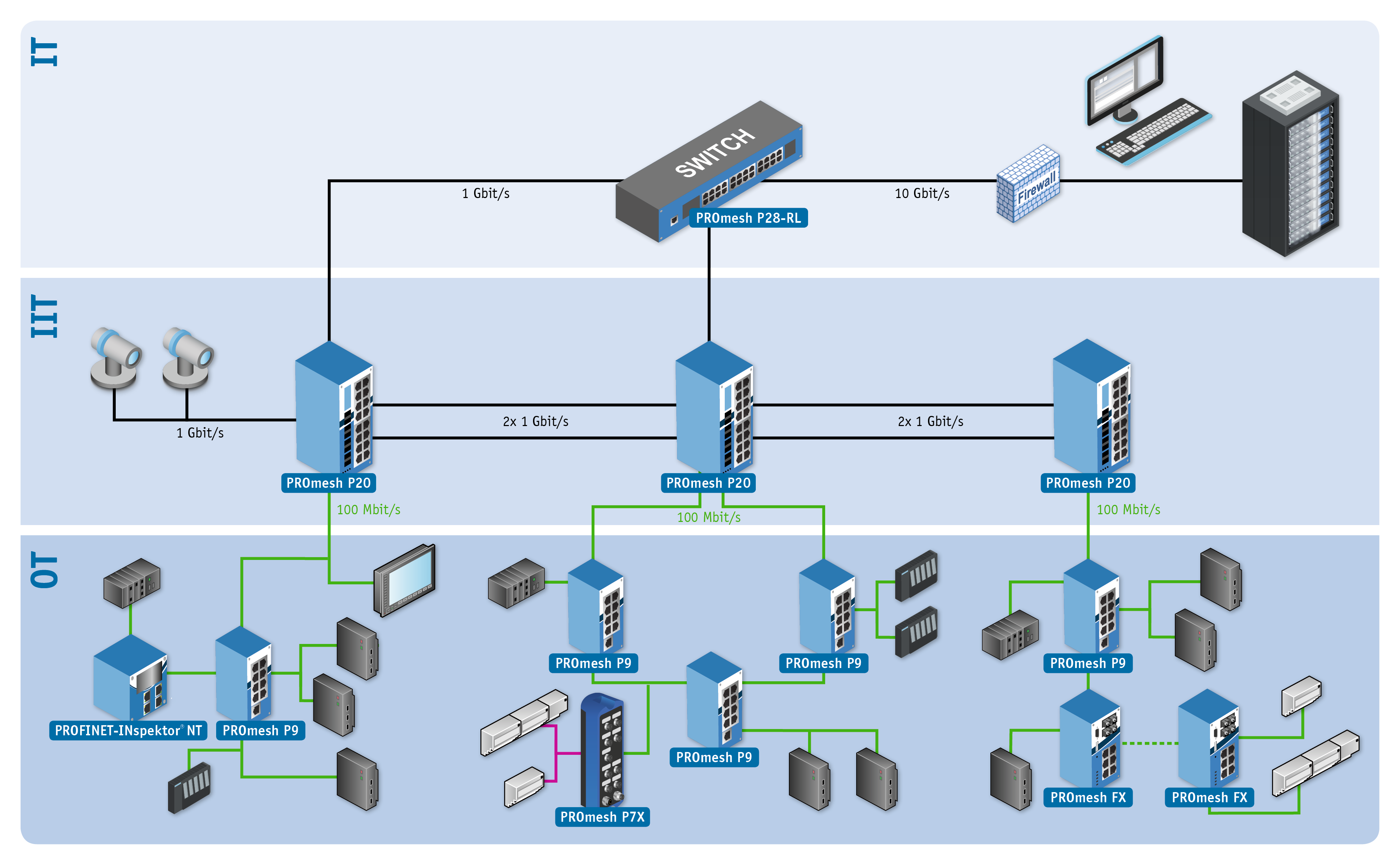 Das Bild zeigt ein Beispiel für den strukturellen Zusammenhang zwischen IT, IIT und OT. Zu sehen ist auch beispielhaft, dass die Switches der Anwendung entsprechend auszuwählen sind (Datenübertragungsrate, Verbindungsart, Funktionalität etc.).